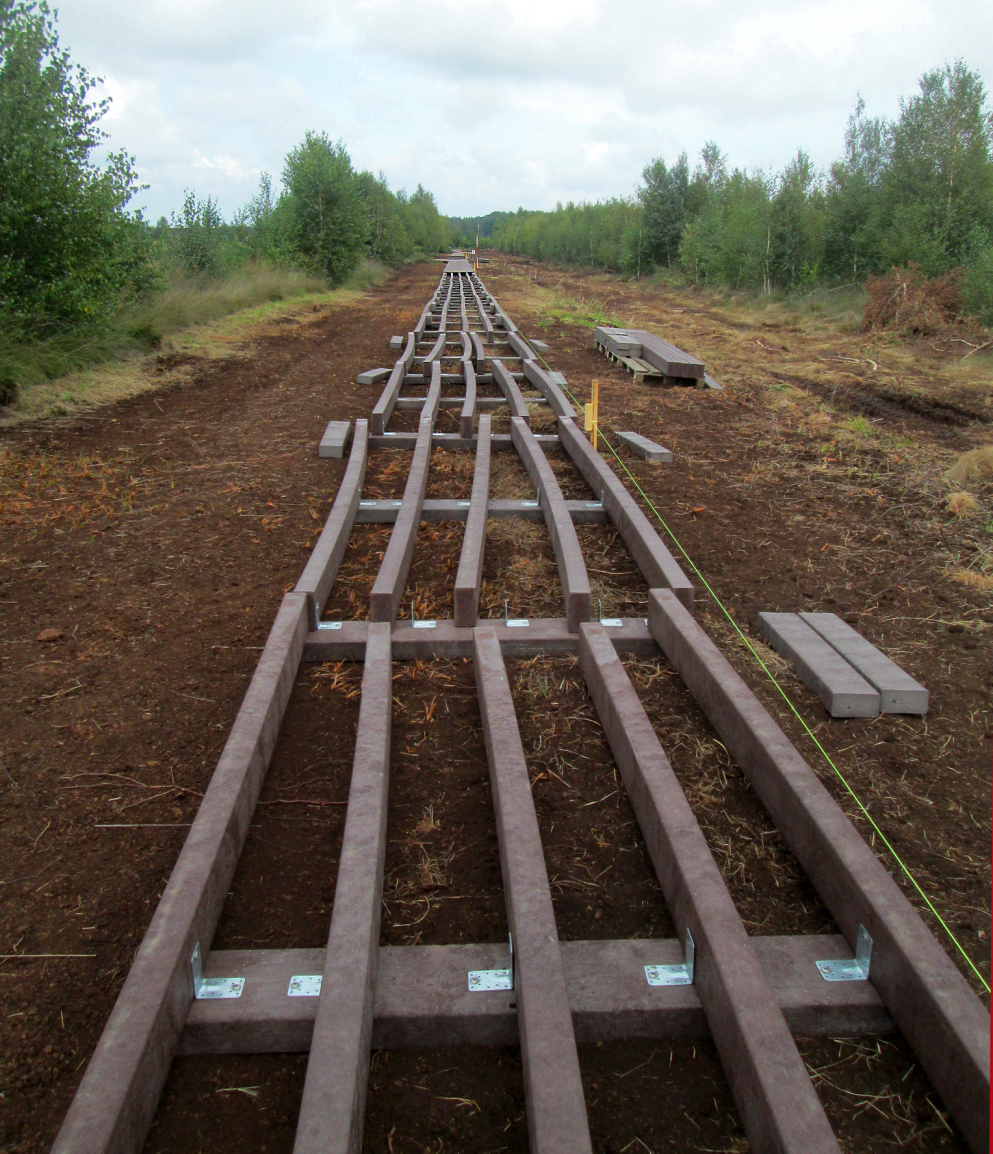 Entstehen der Moorloipe als Holzsteg parallel zum historischen Moorweg im Aschener Moor